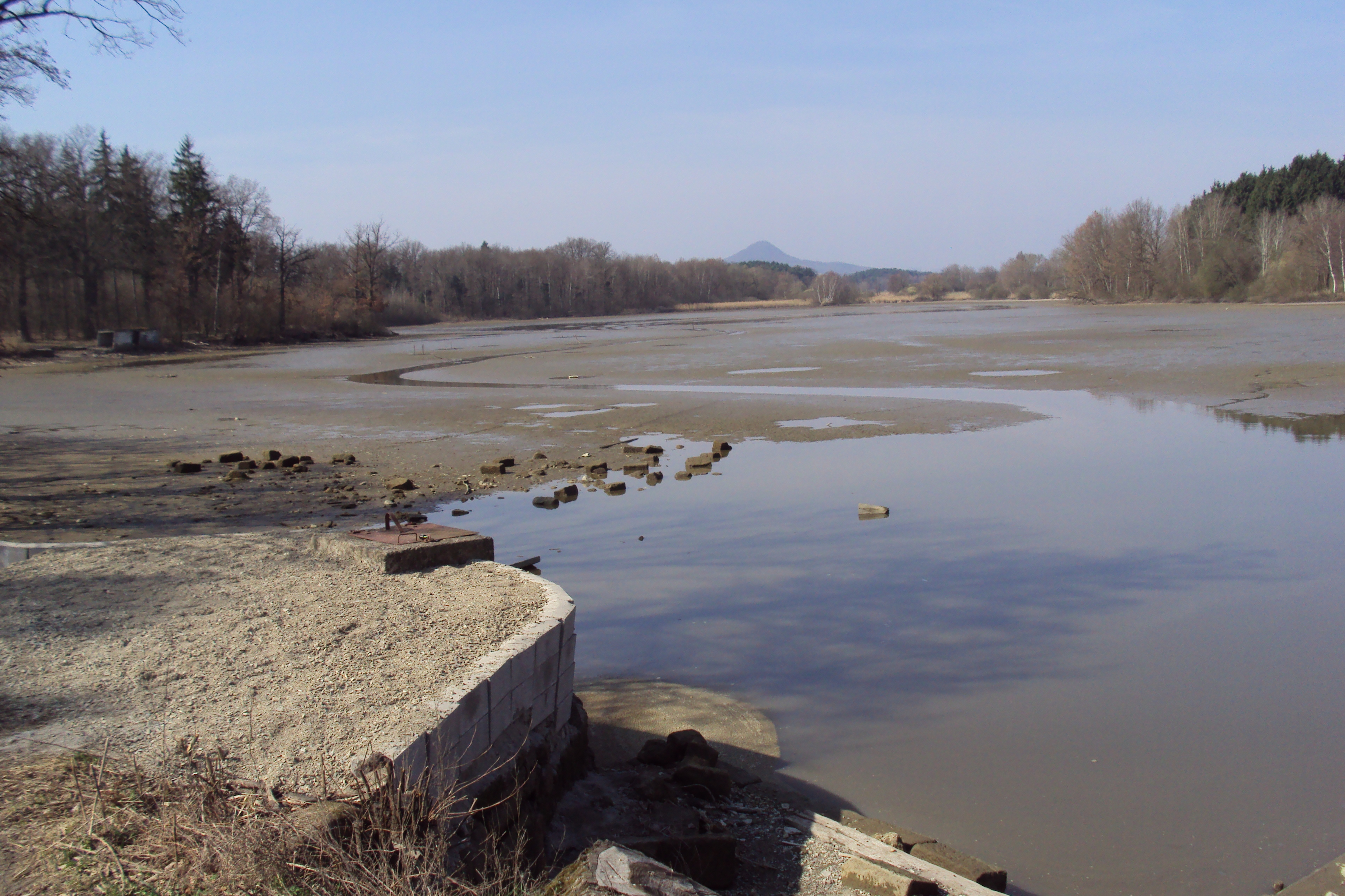 Rybník je u silnice Holany-Zahrádky, katastr Zahrádky 790273, v pozadí Ronov